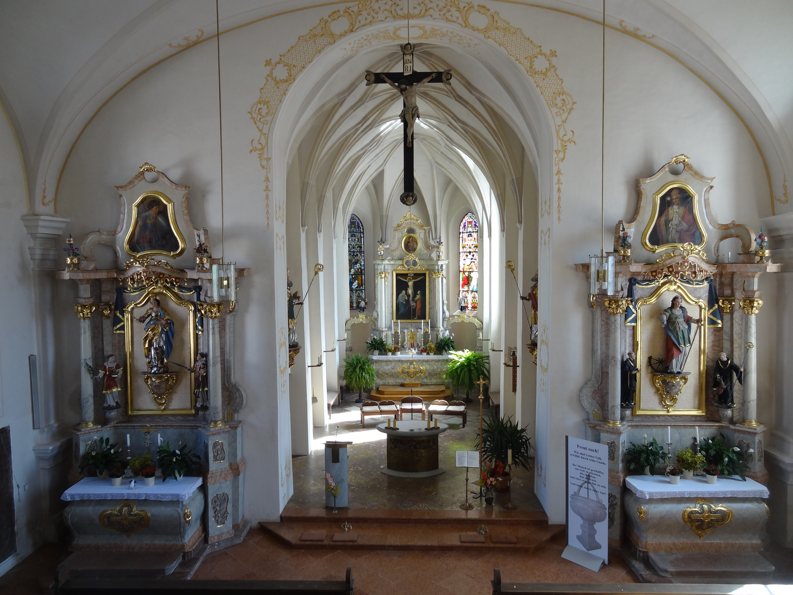 Innenansicht der kath. Pfarrkirche St. Johann Baptist in Binabiburg (Gde. Bodenkirchen, Lkr. Landshut, Bayern)